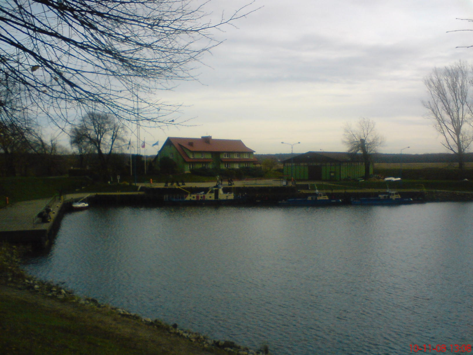 Nadzór Wodny Słubice (port rzeczny nad Odrą).